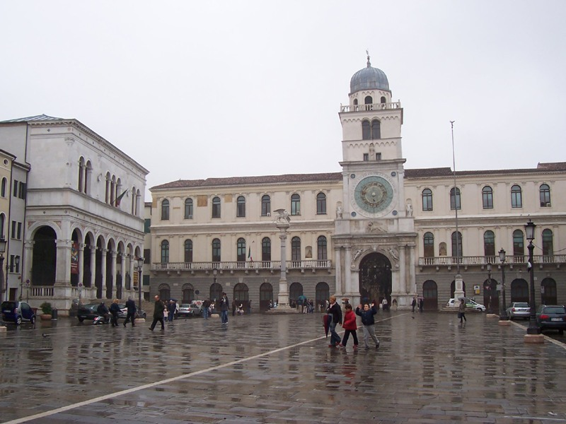 Piazza dei Signori a Padova